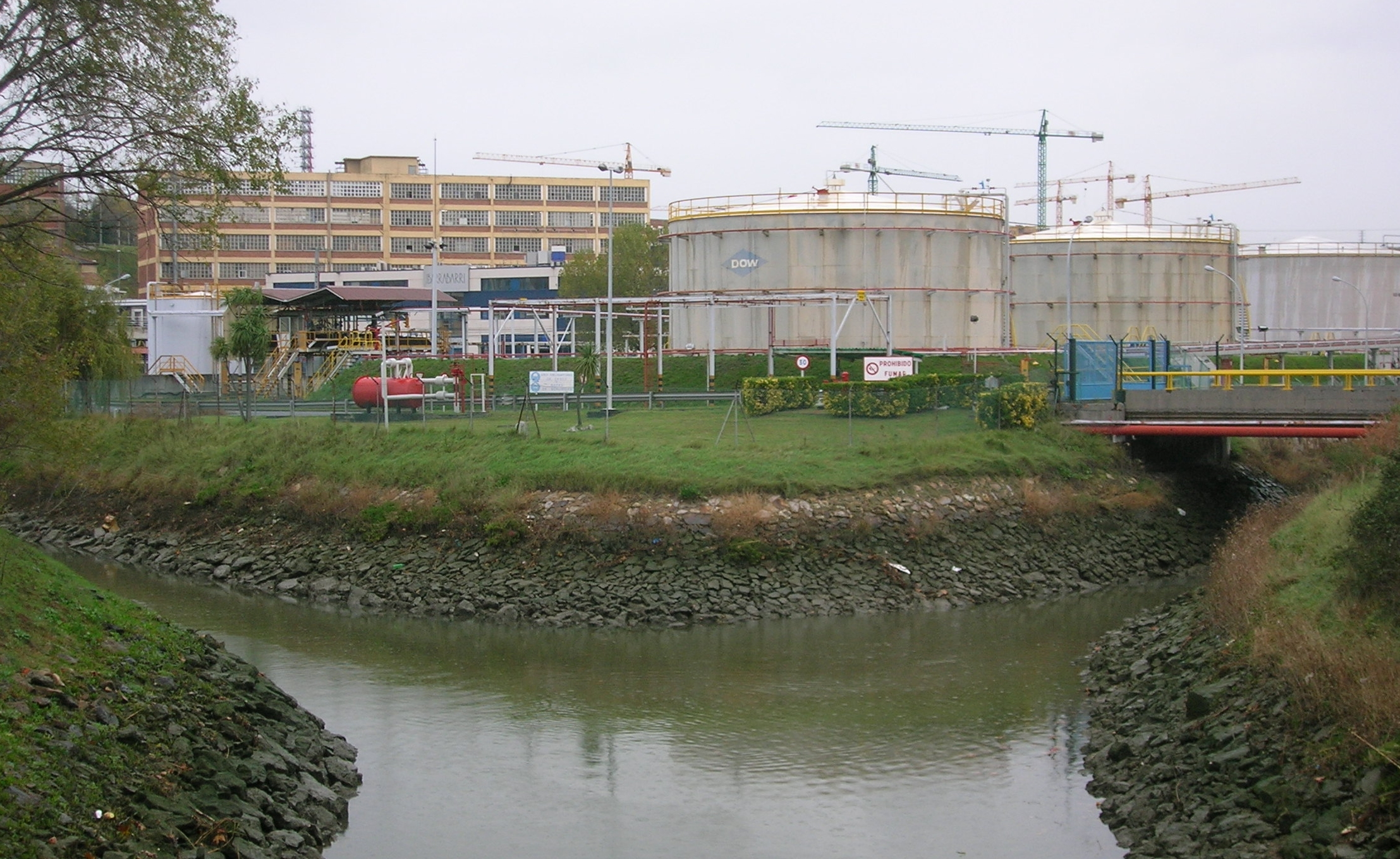 Confluencia de los ríos Udondo y Gobela en Leioa, Vizcaya.